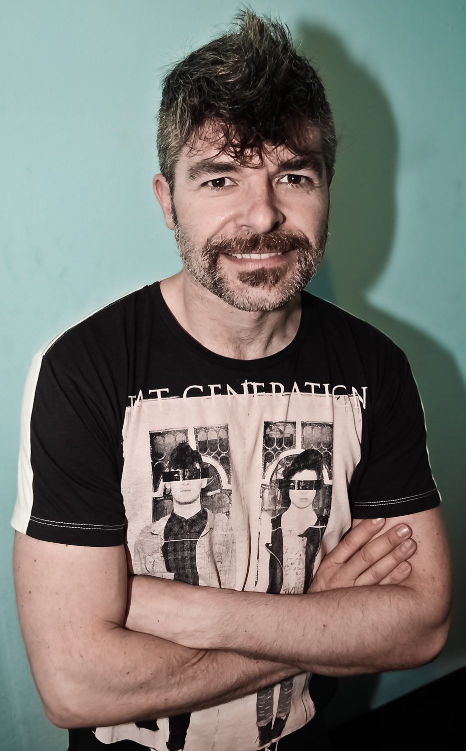 Nacho Guerreros